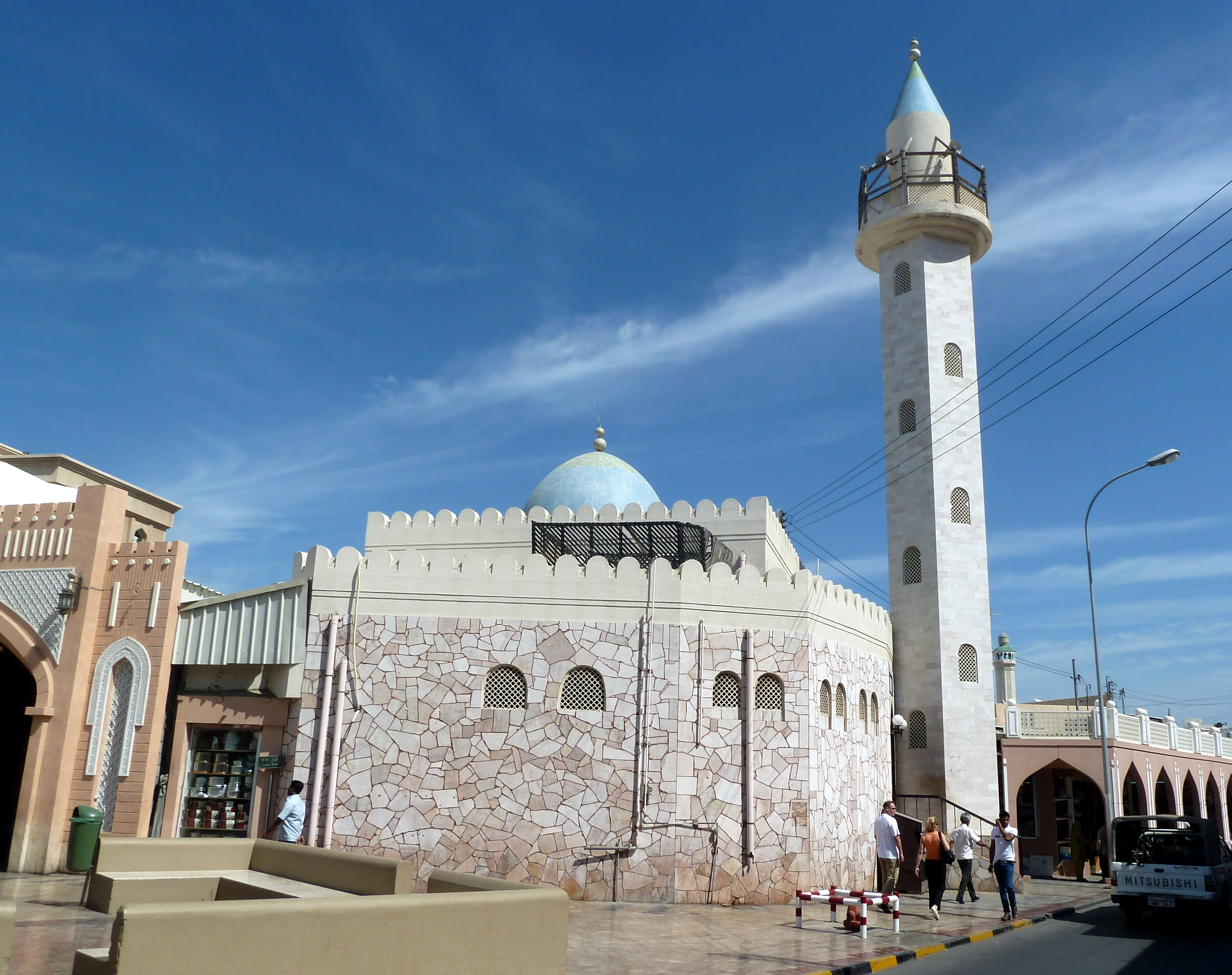 Moschee in Muttrah Nähe Souk -- المسجد في مطرح البحري آل شارع